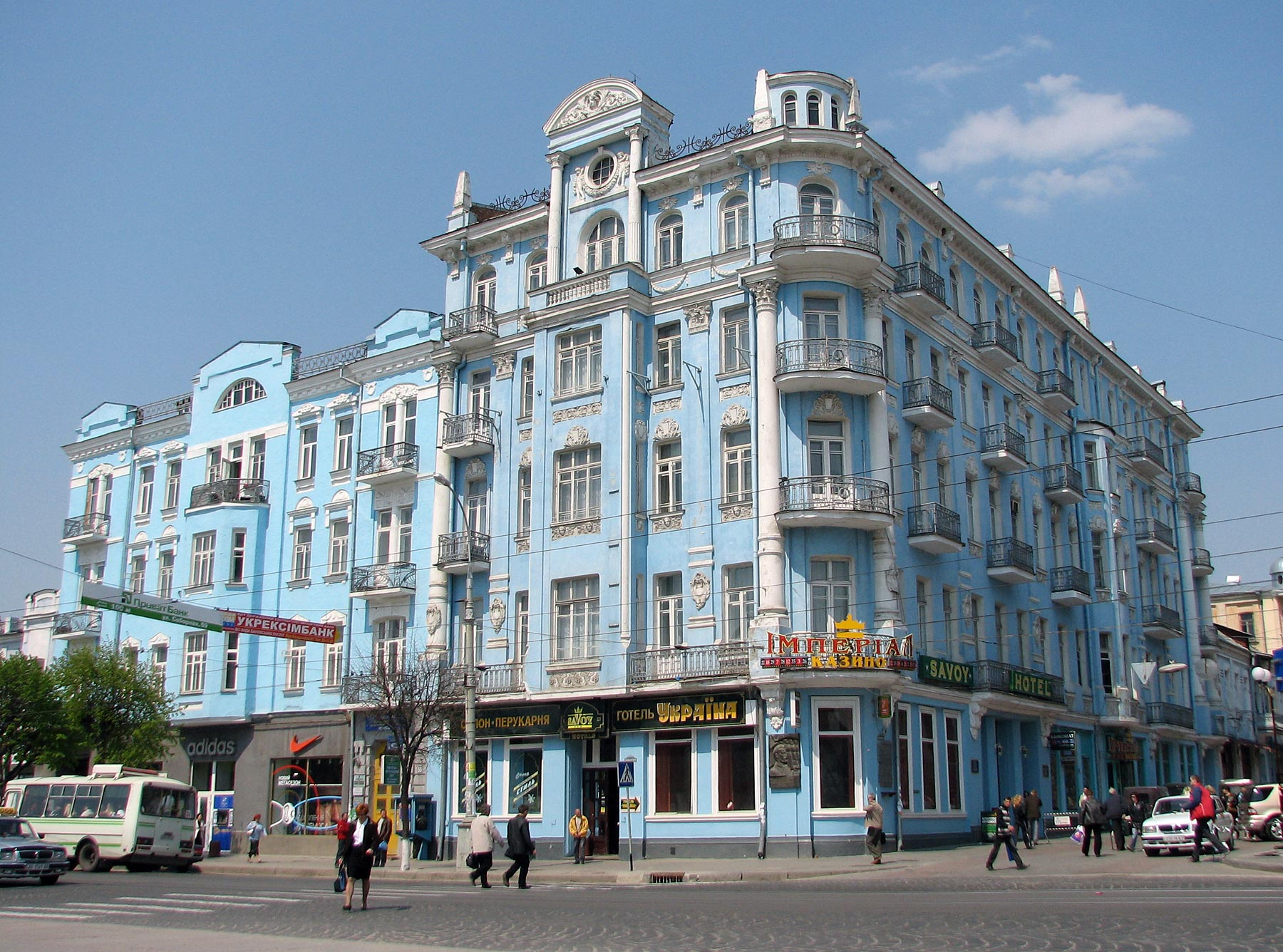 Hotel Savoy in Vinnytsia, Ukraine